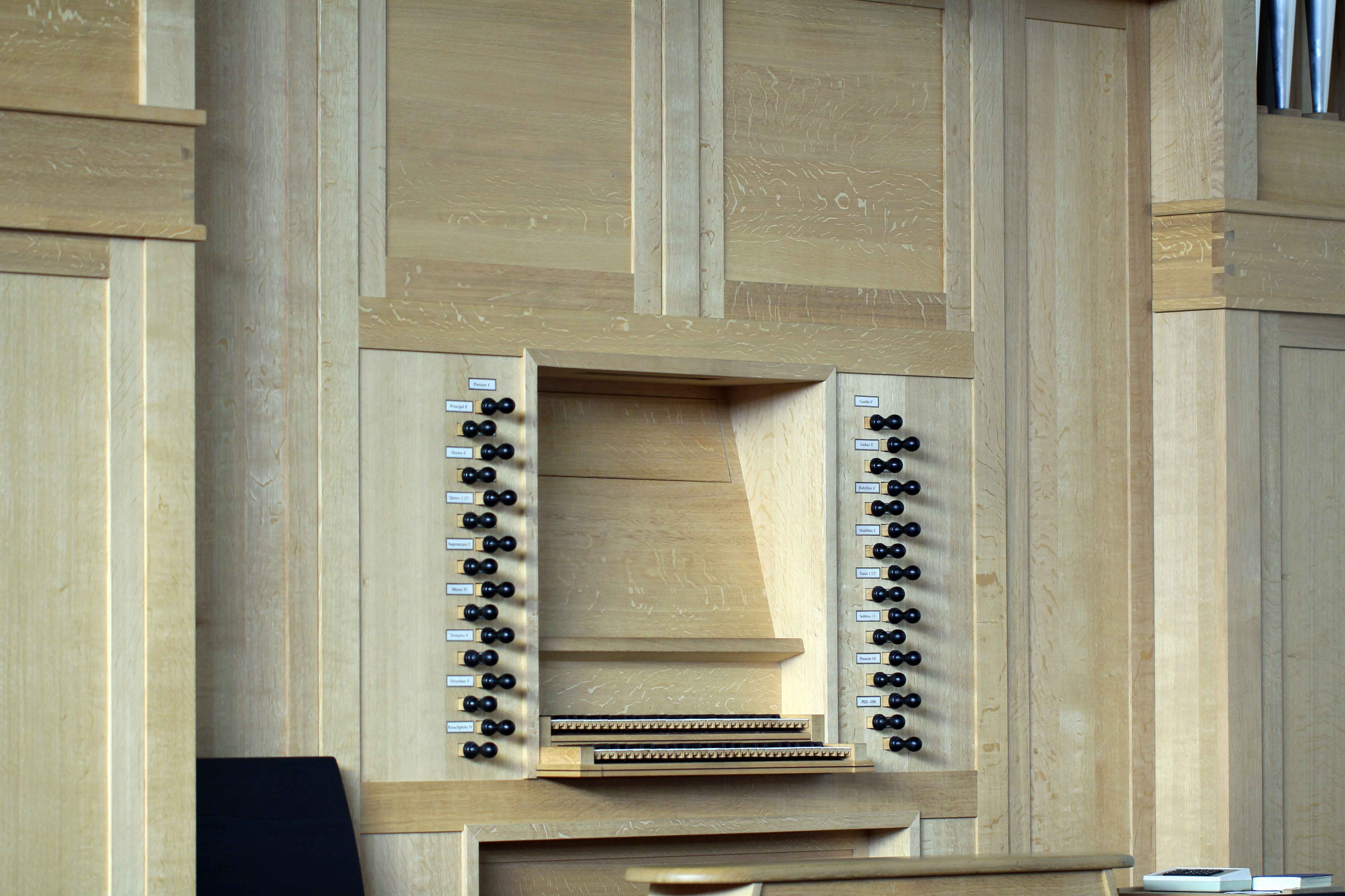 Römisch-katholische Kirche Allerheiligen Zürich-Neuaffoltern, Edskes-Orgel Spieltisch